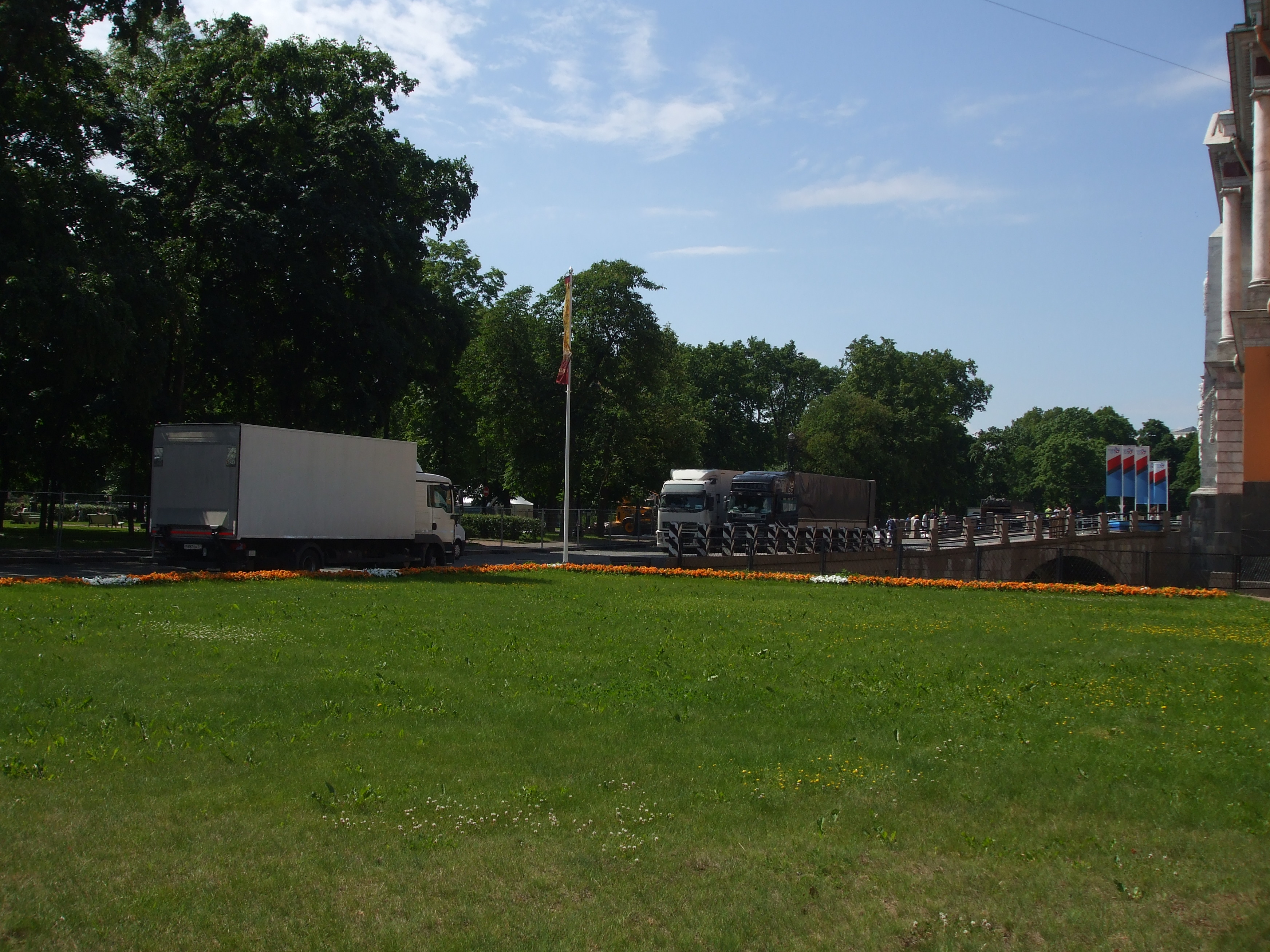 Замковая улица, подготовка к мероприятию G20, вид с Фонтанки